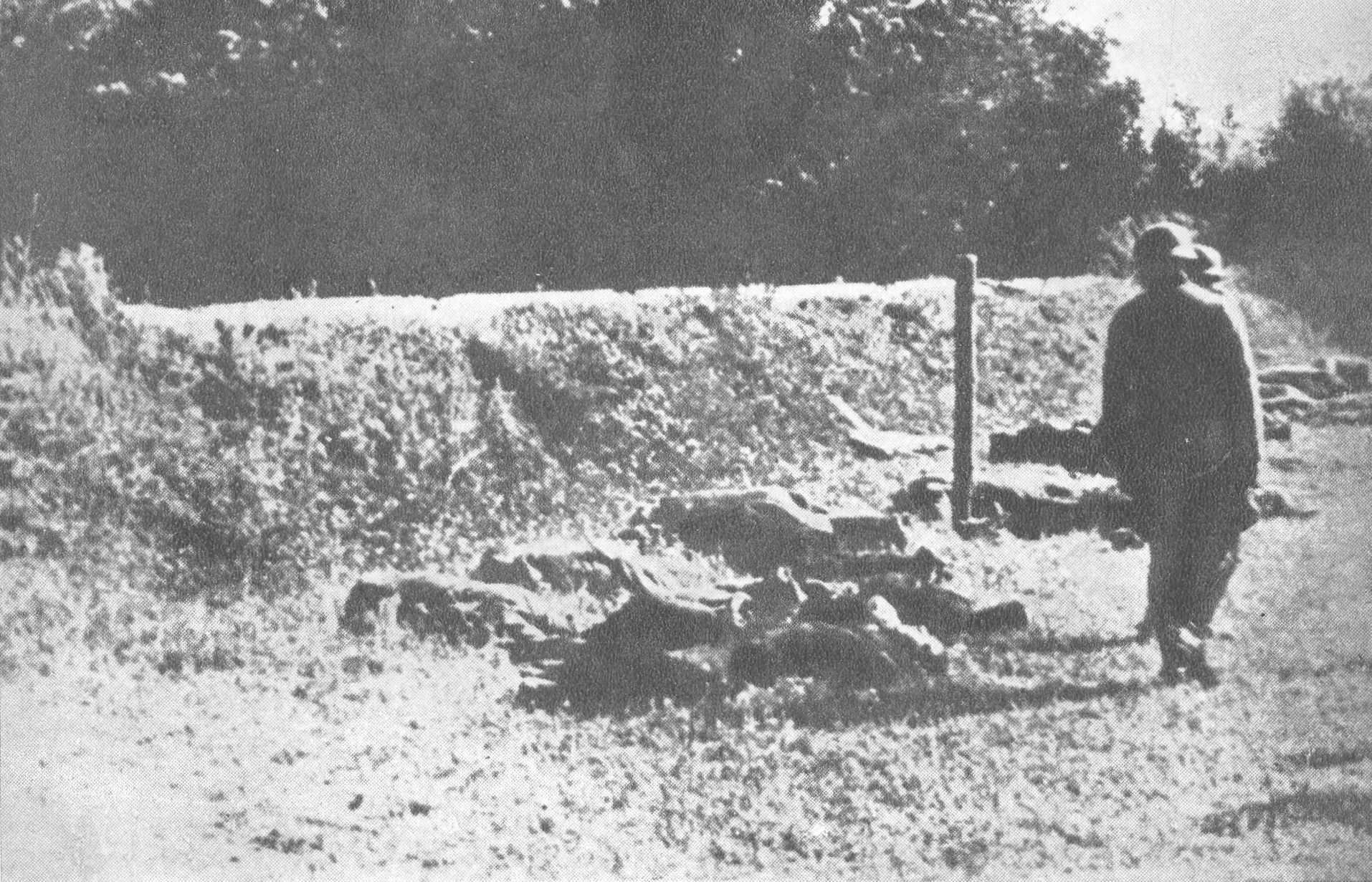 Српски (ћирилица): После првог стрељања на Бањици, 16. јула 1941.